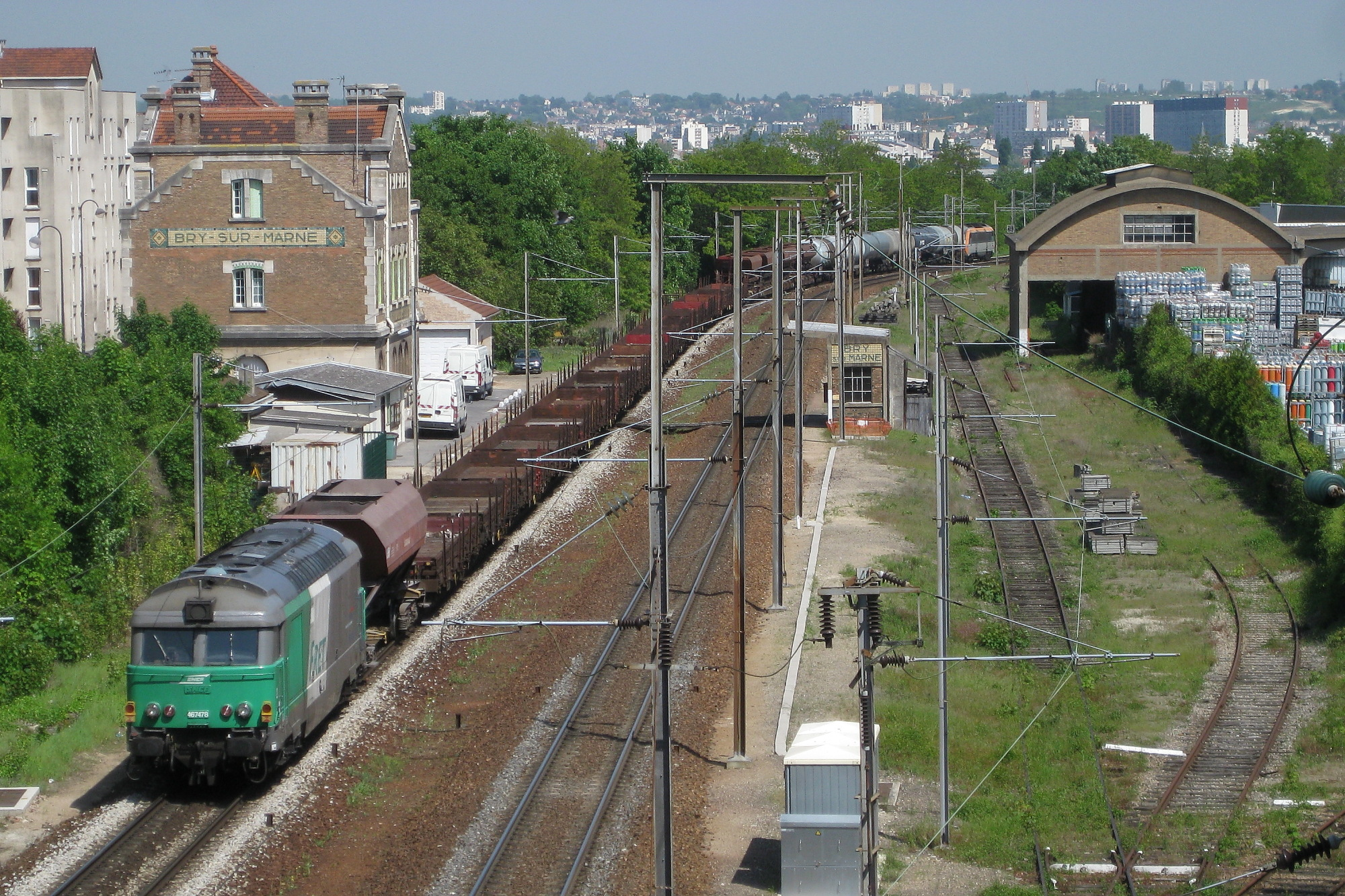 Un train de fret tiré par le BB 26107 (à l'arrière-plan) et avec la BB 67478 en véhicule de queue franchit la gare SNCF de Bry-sur-Marne, sur la grande ceinture complémentaire d'Île-de-France.